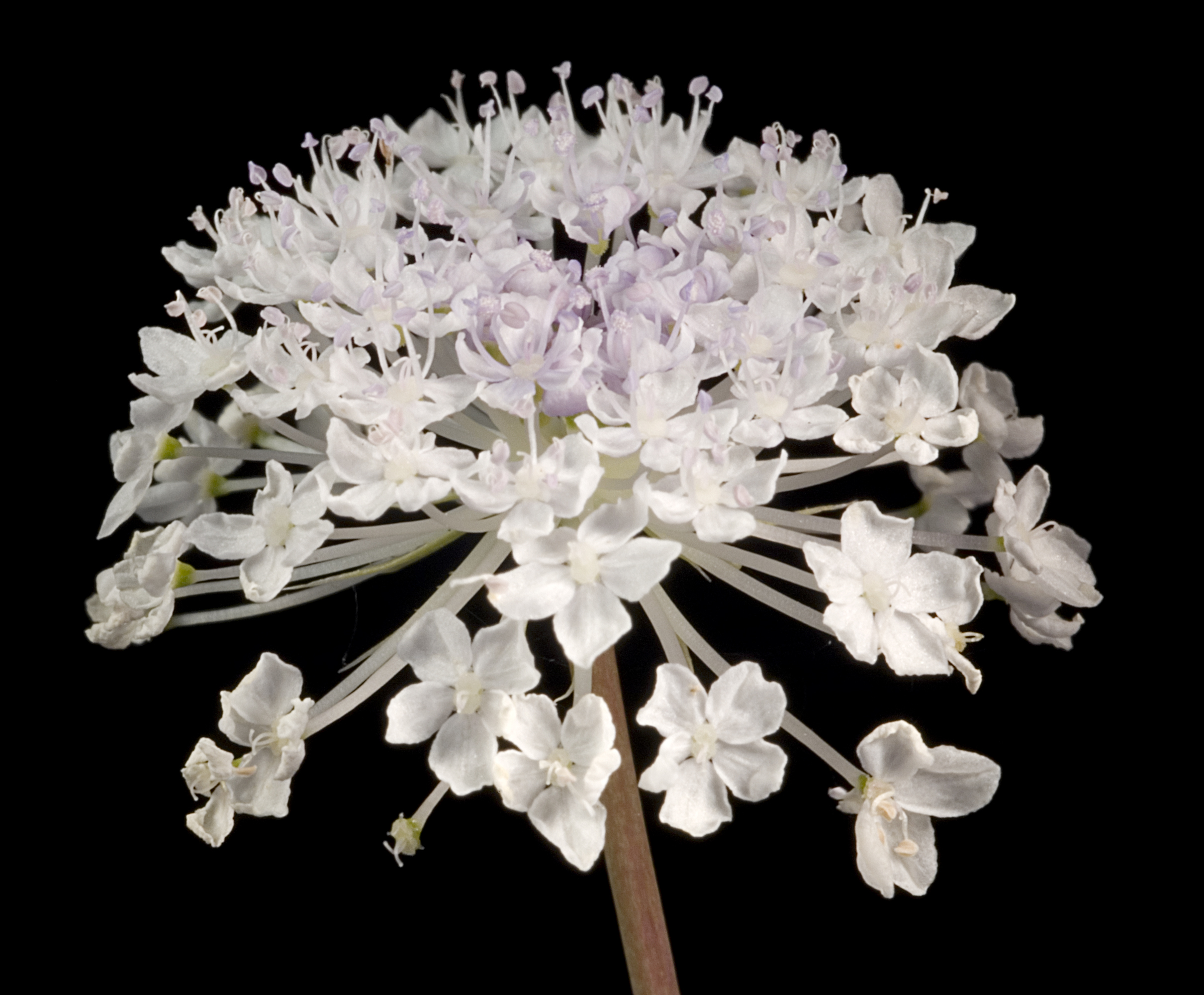 KRT3463